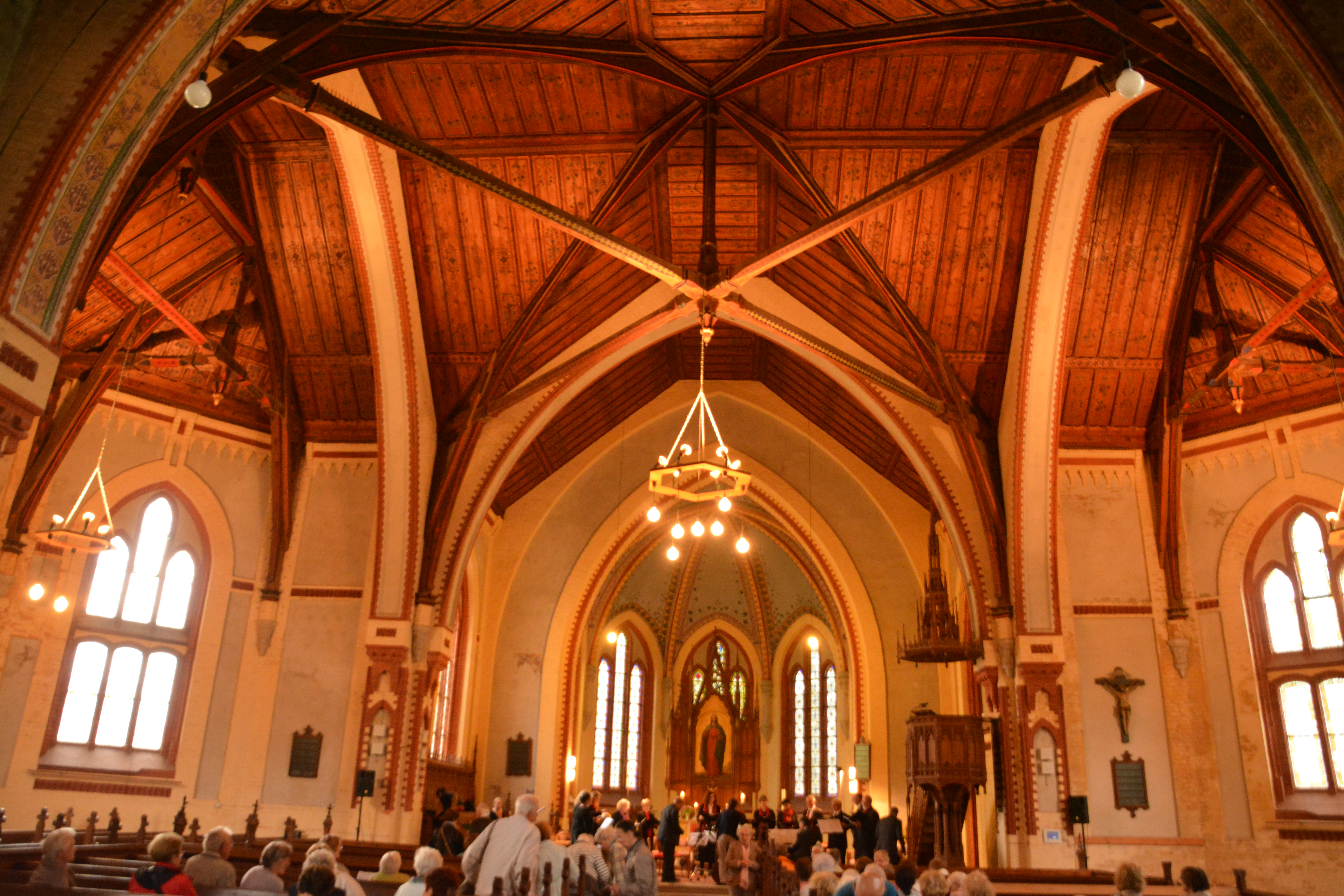 Warin Kirche Innenansicht, Blick zum Chor